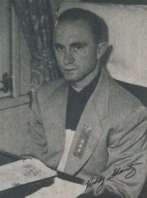 1951年の訪日時のボビー・シャンツ